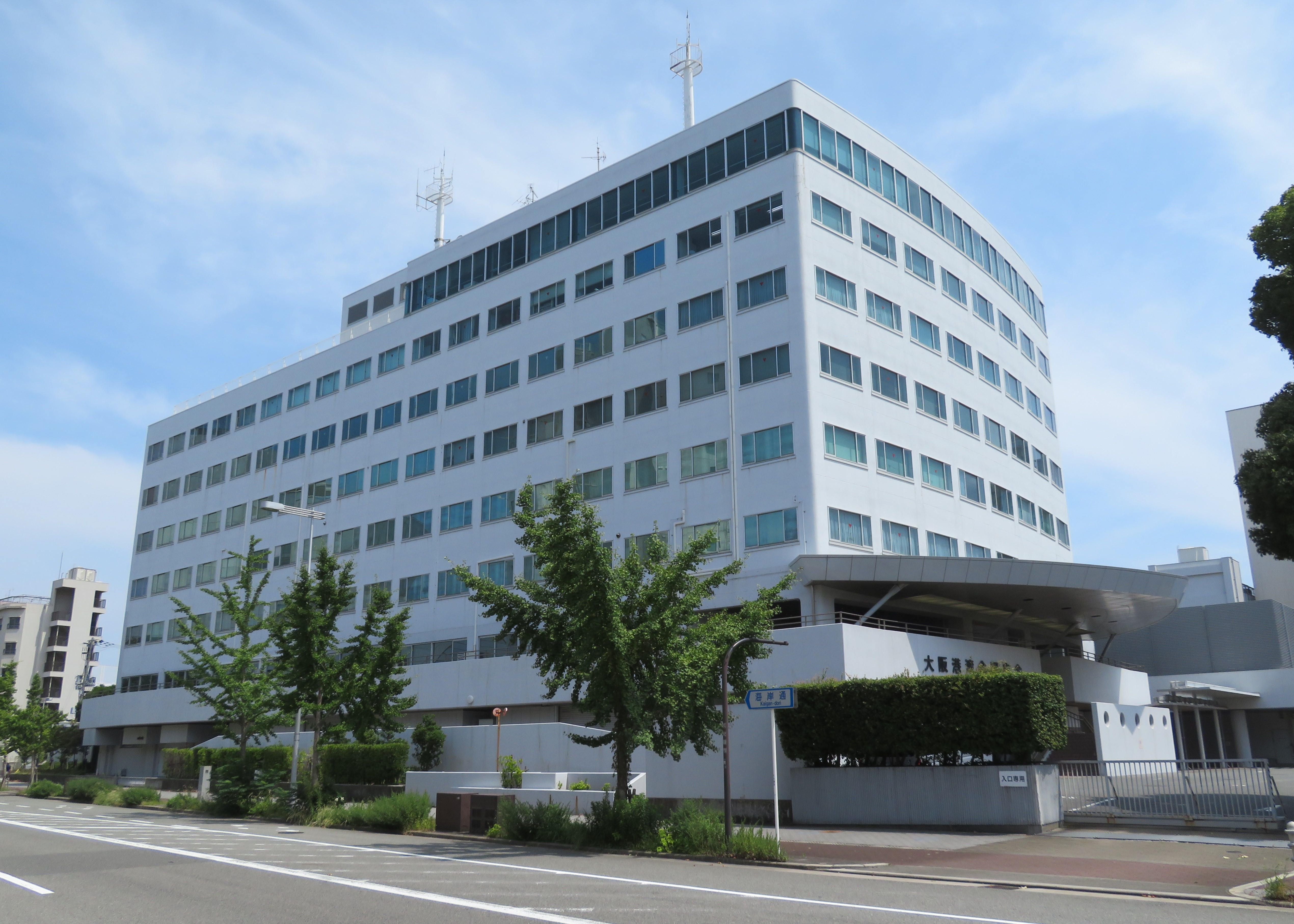 大阪港湾合同庁舎